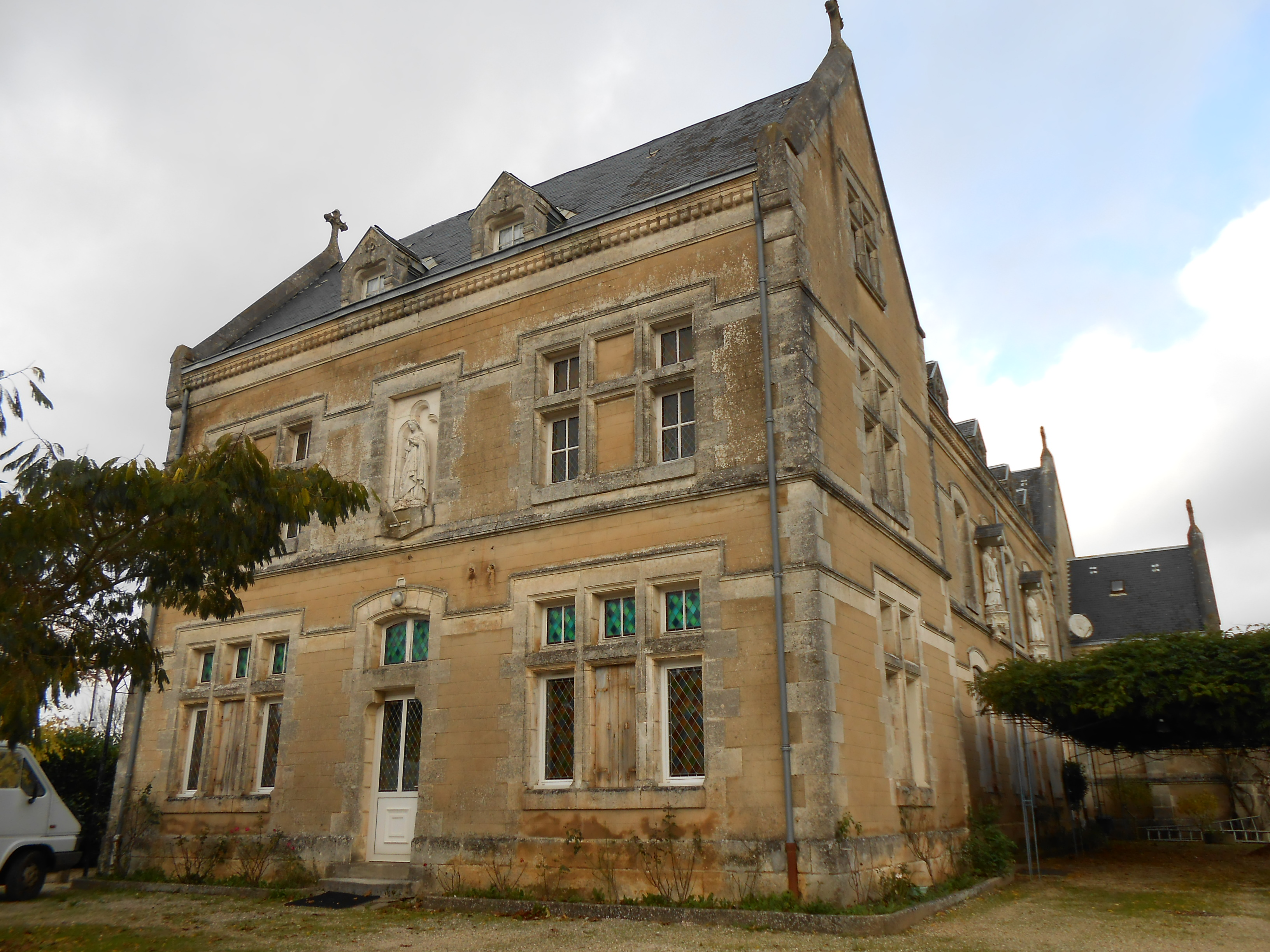 La Coquille - ancien couvent sainte Marie, Dordogne, France.